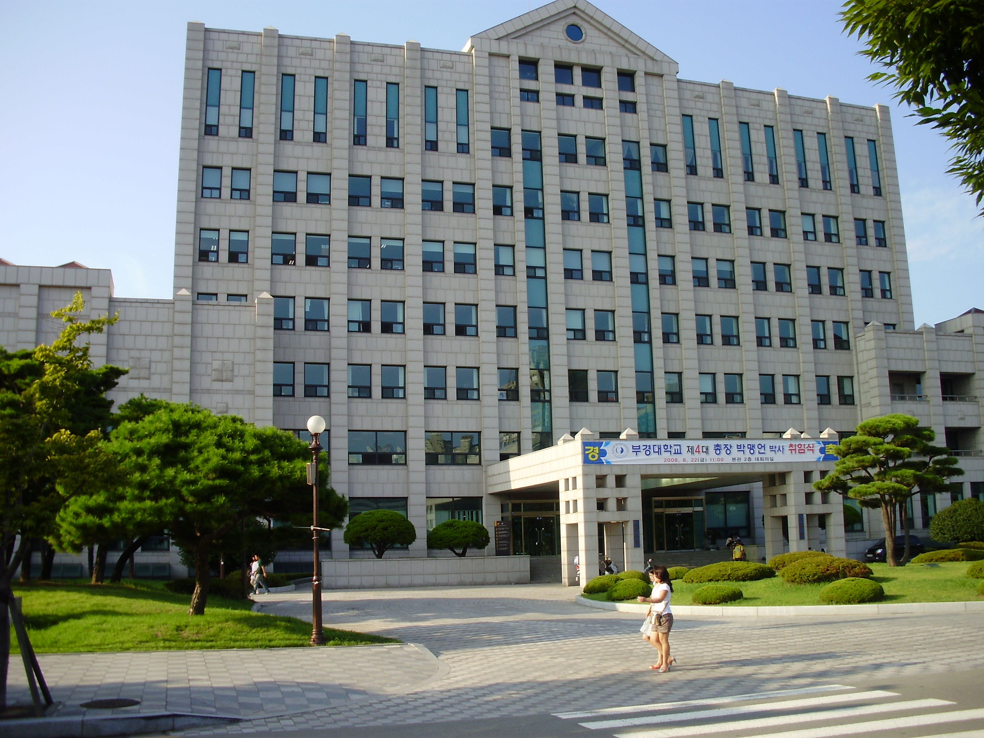 부경대 대연캠퍼스 본관.